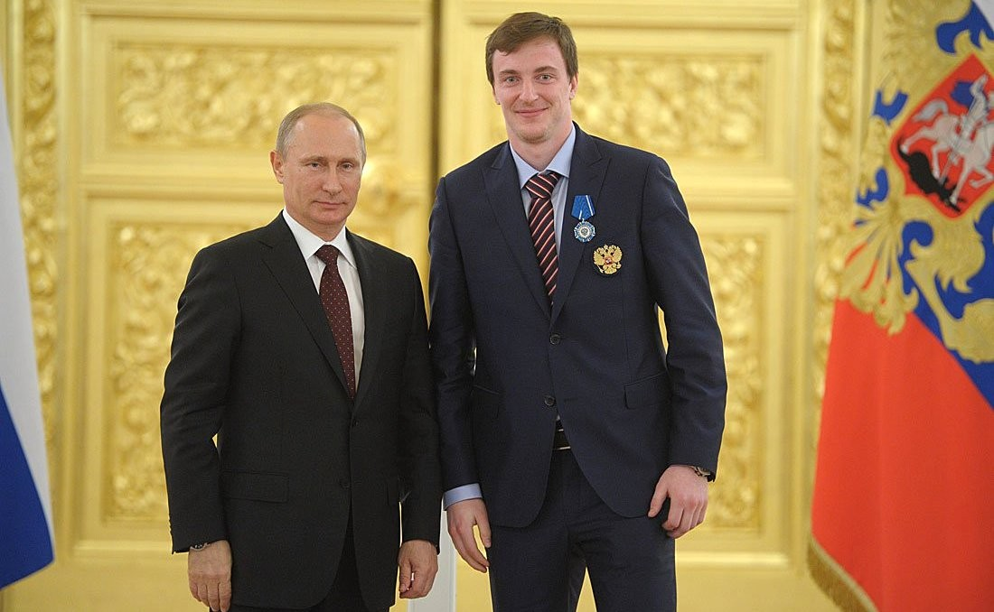 С нападающим сборной России по хоккею Сергеем Калининым